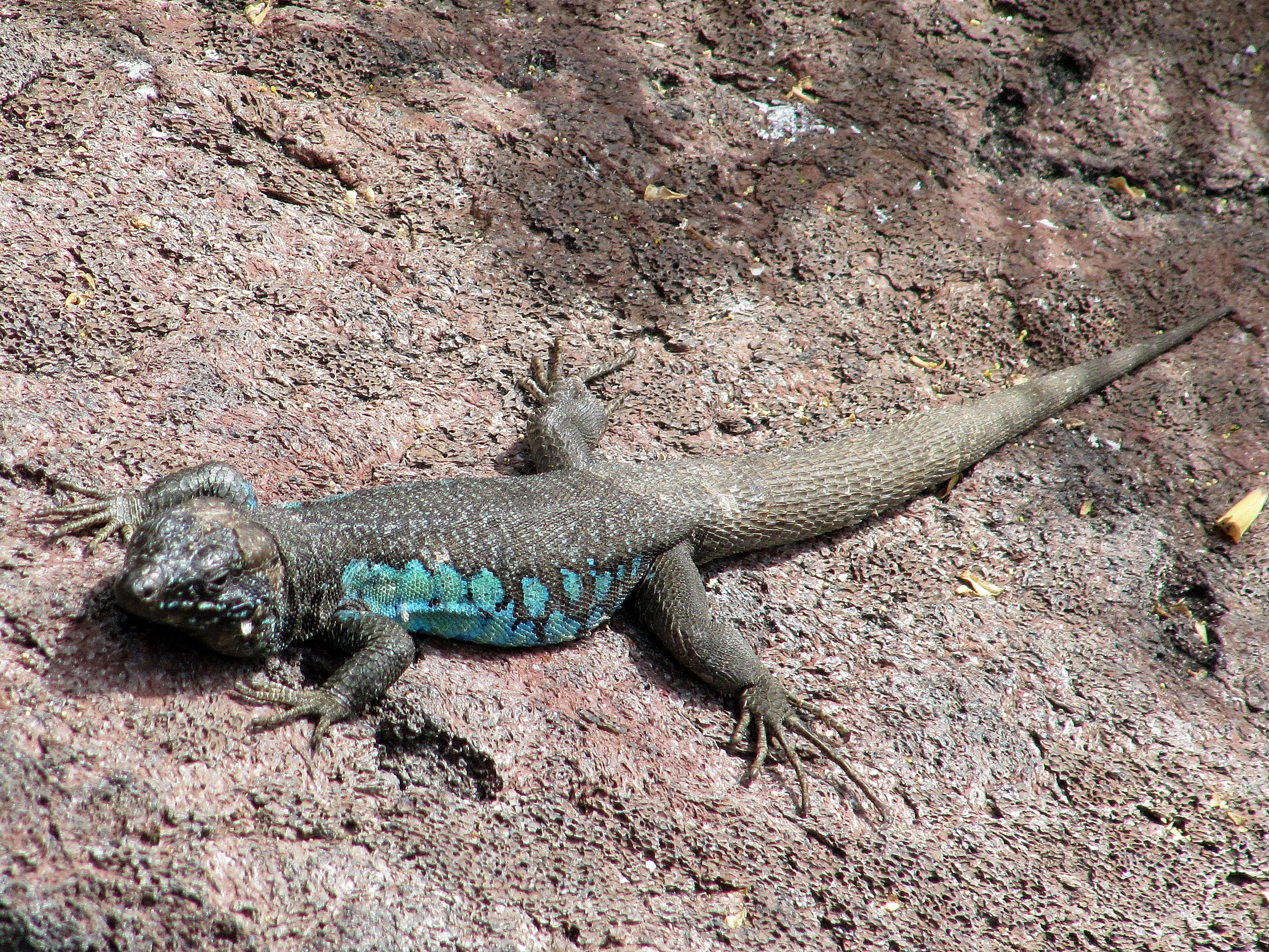 Lagarto fotografiado en la entrada de la Cueva de los Verdes, en la isla canaria de Lanzarote. Es un Lagarto Atlántico (Gallotia atlantica) especie endémica de las Islas Canarias orientales. Esta presente en Lanzarote y Fuerteventura así como en otros pequeños islotes como La Graciosa, Montaña Clara, Alegranza, Roque del Este e Isla de Lobos. El ejemplar es macho por las manchas azules que presenta. Muy coqueto se dejó fotografiar por los turistas que se disponían a visitar la citada Cueva de los Verdes, posando tranquilamente para todos.